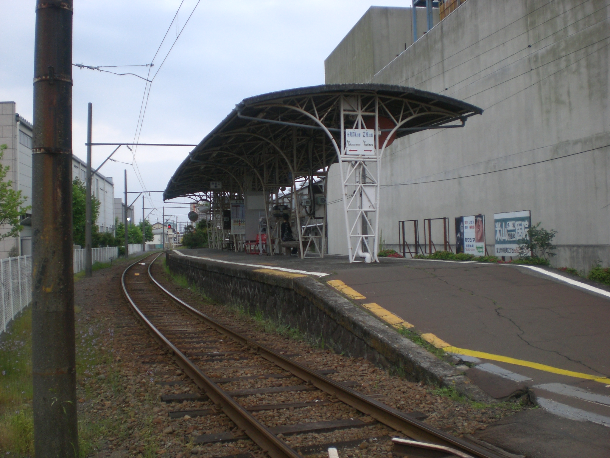 岳南鉄道・本吉原駅